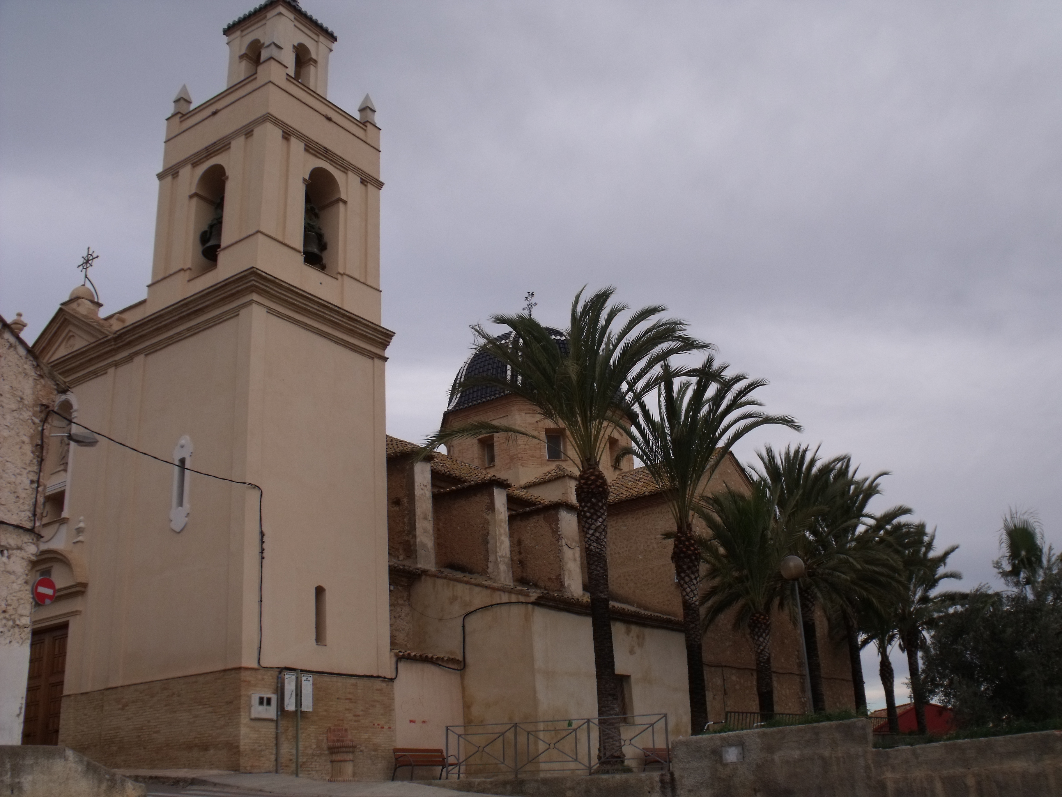 Iglesia de San Pedro Apóstol. Godelleta.